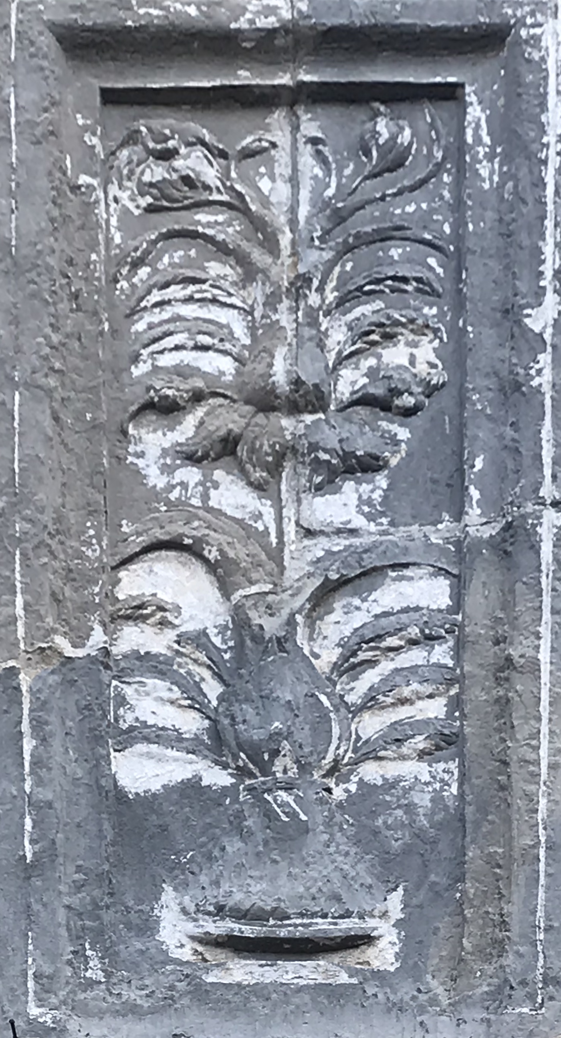 Chiesa di Santa Maria del Soccorso a Caccuri